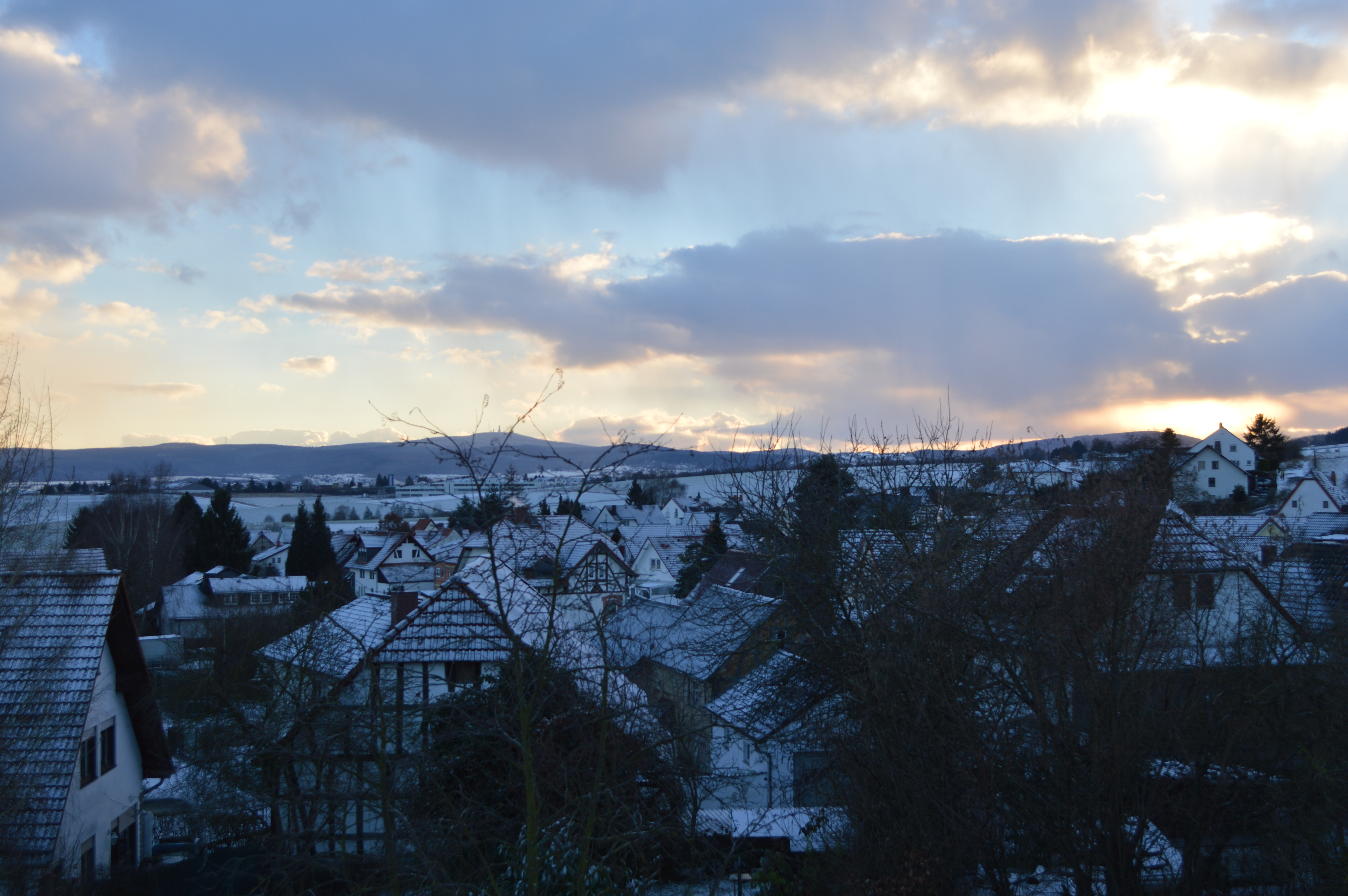 Usinger Becken und Großer Feldberg Januar 2017